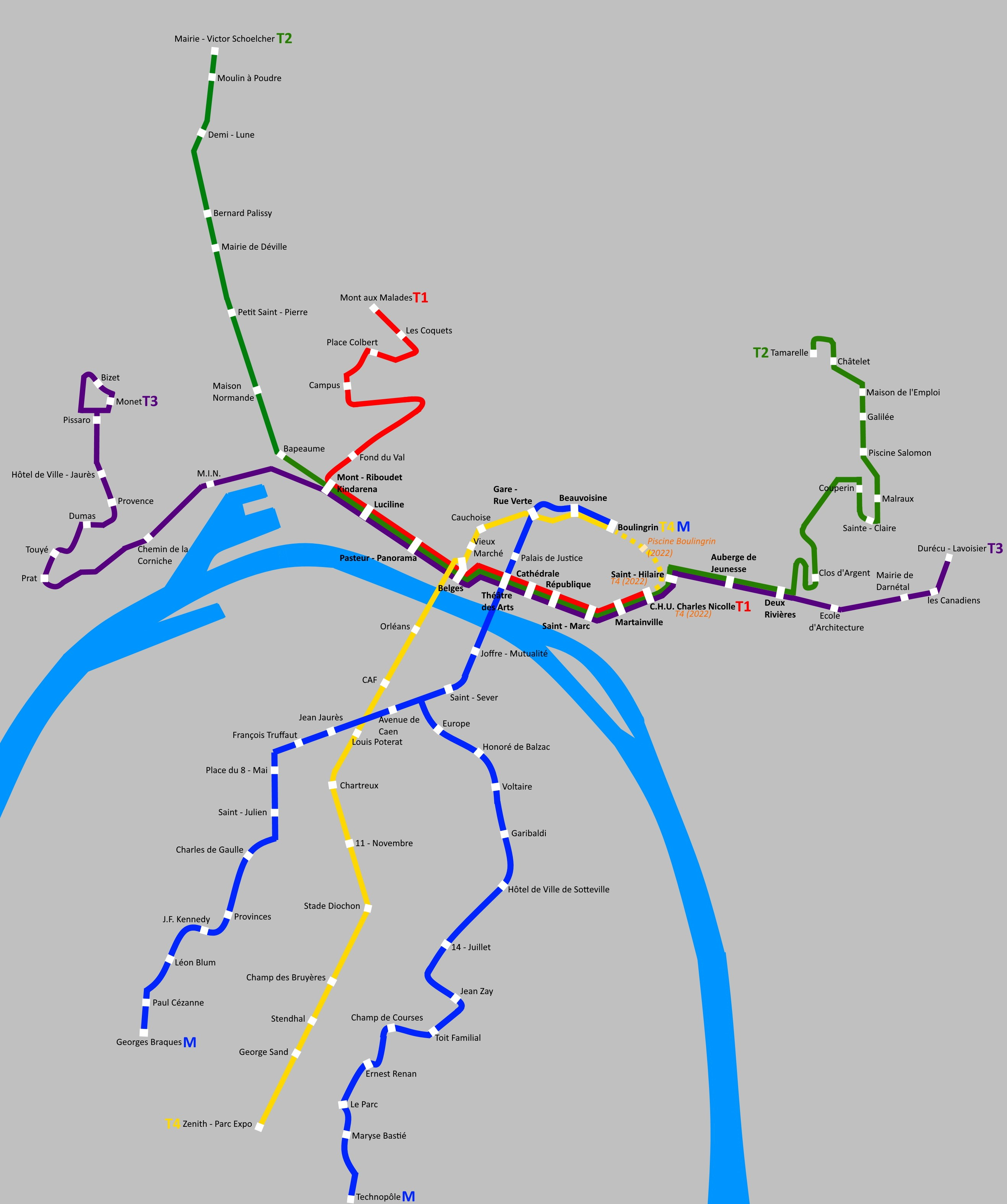 Les lignes 1, 2, et 3 du TEOR desservent un axe est-ouest tandis que le tramway et la ligne 4 du TEOR desservent un axe nord-sud